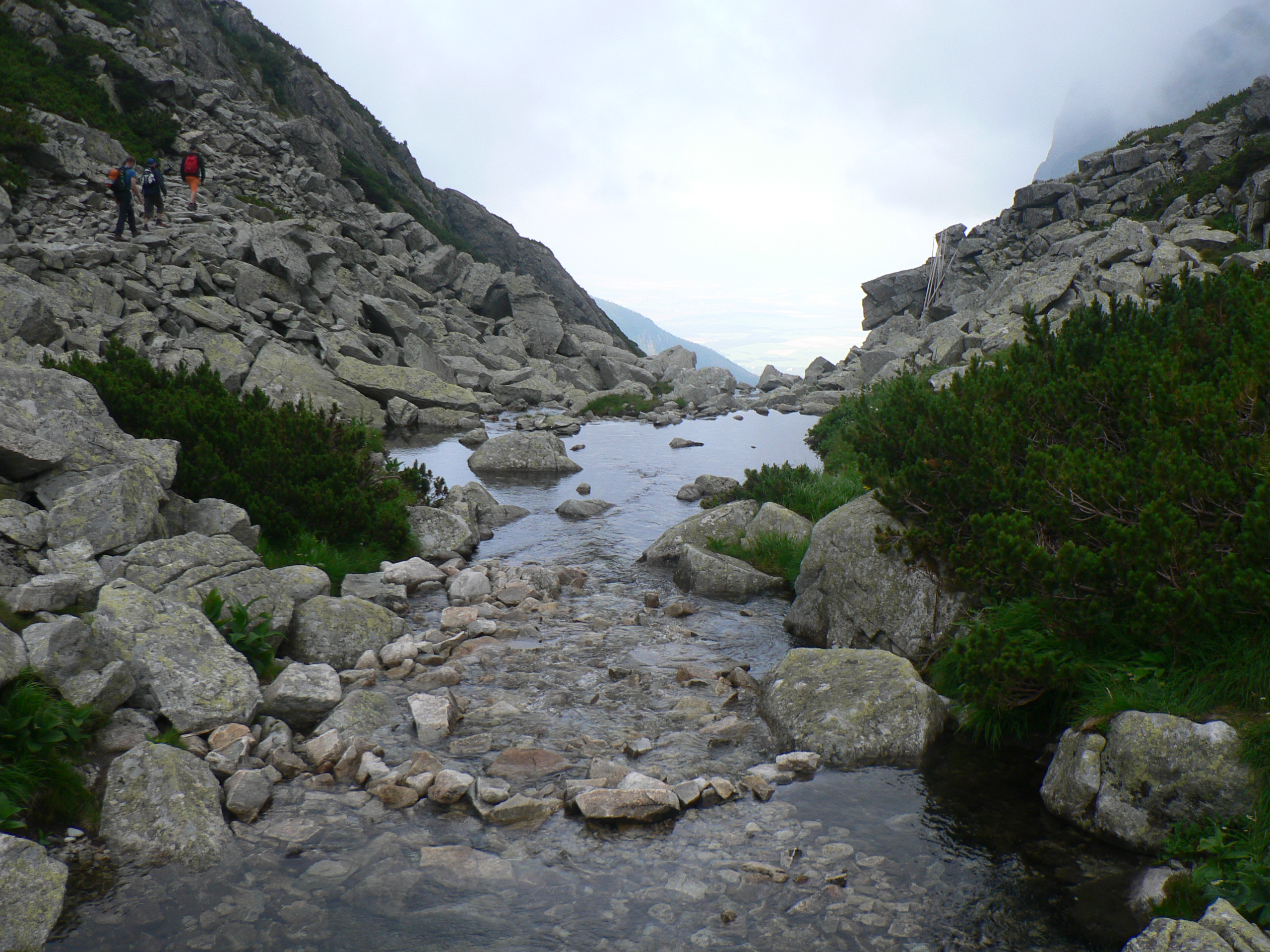 Staroleśny Potok w Dolinie Staroleśnej